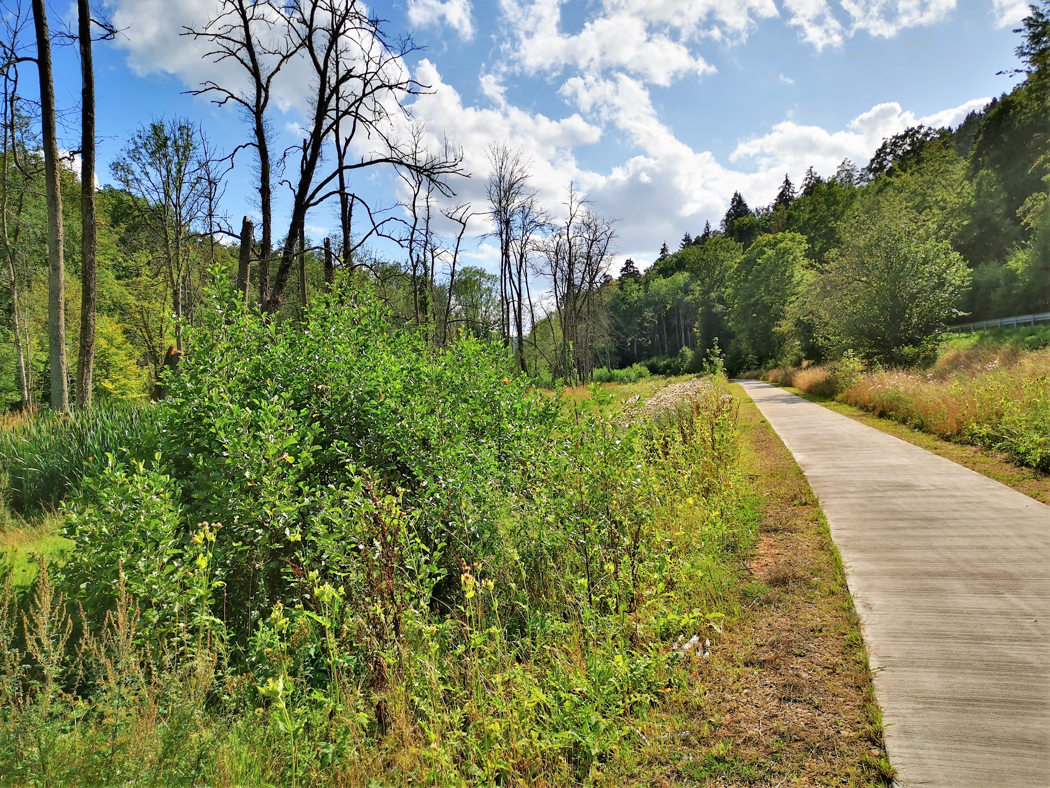 La piste cyclable de l'Ernz Blanche, entre Soup et Koedange